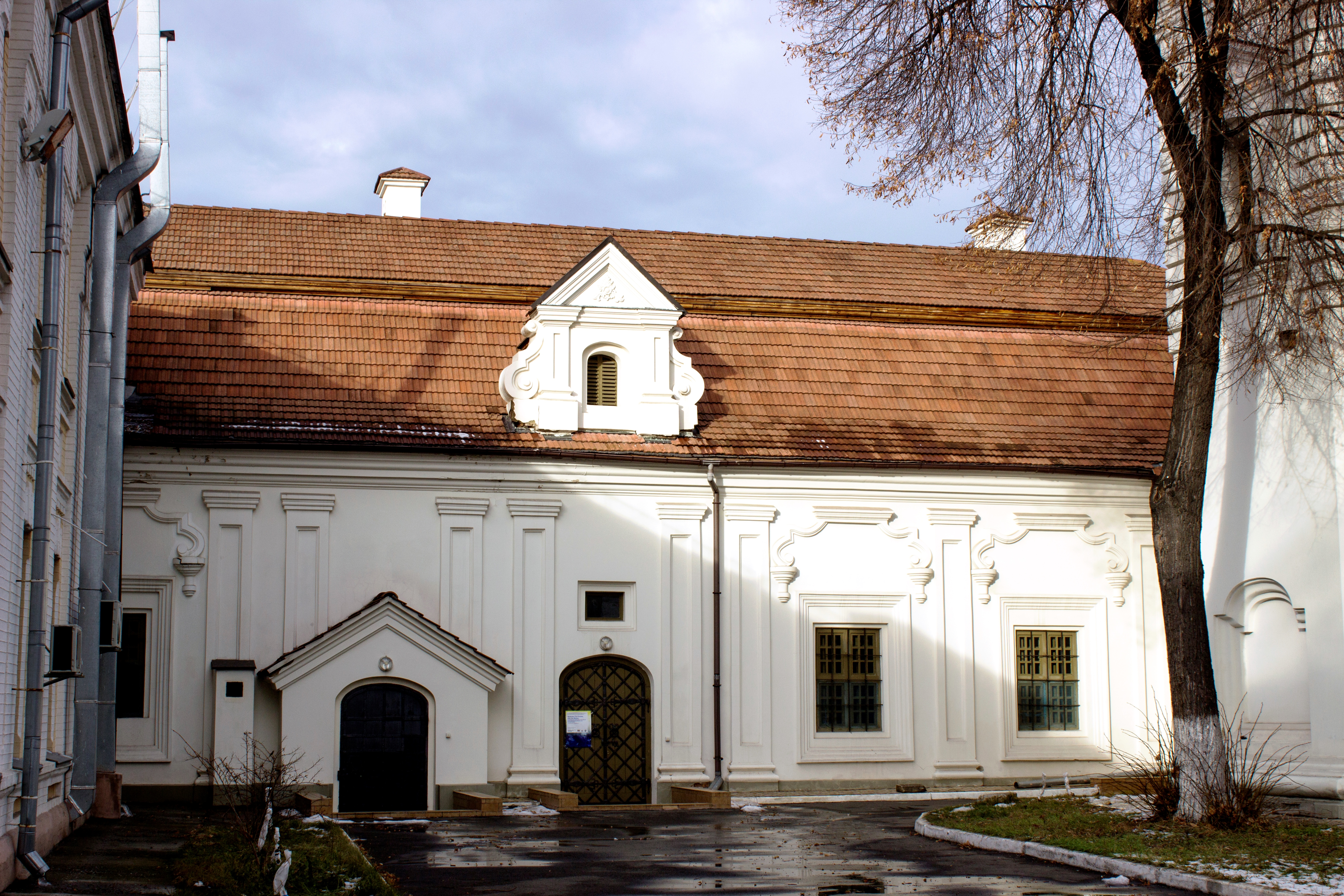 Поварня з келіями, Київ, Сковороди Григорія вул., 2-а